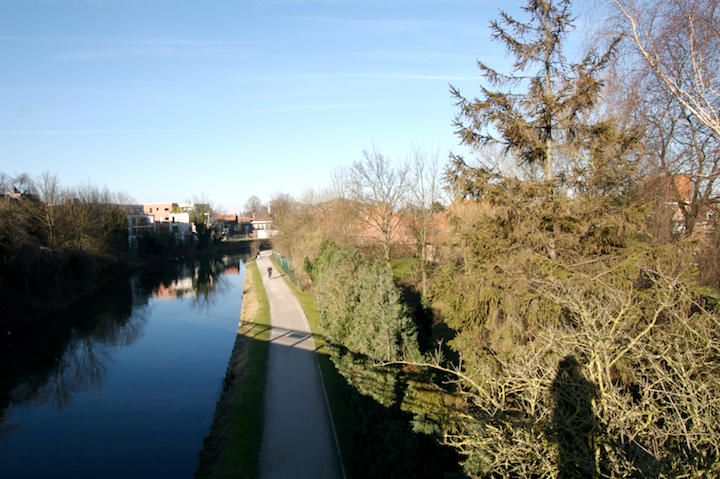 La marque